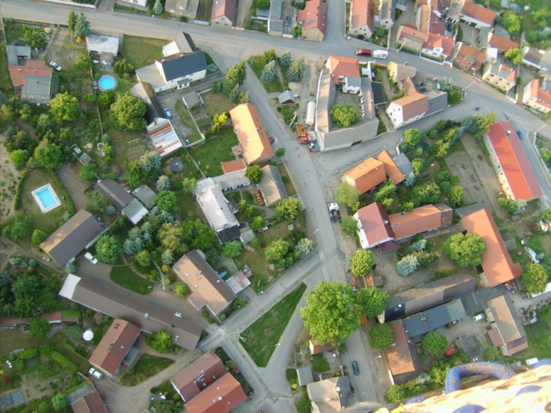 Dorfmitte von Haida